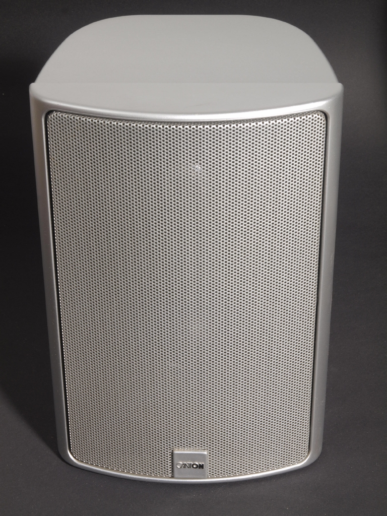 Canton Plus XL Lautsprecher für Subwoofer-Satelitten-System oder Ergänzungsbox. 2-Wege Kleinlautsprecher, Nenn-/Musikbelastung 60/110 Watt, 4 bis 8 Ohm, 40 bis 30 000 Hertz. Hersteller Canton Elektronik GmbH + Co KG in Weilrod.